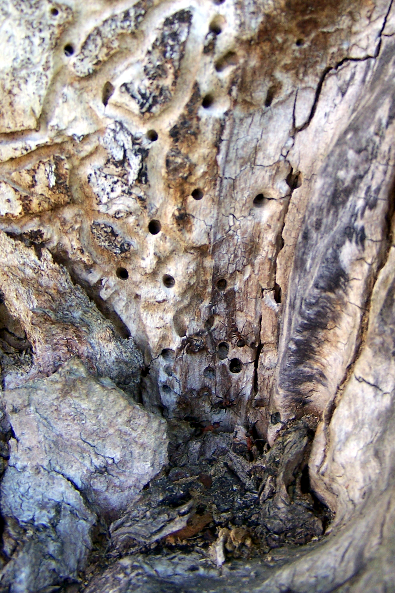 Památný strom Klášterecký klen (neboli Panouškův javor) v Klášterci nad Orlicí. GPS: 50°6'40.932"N, 16°33'11.916"E